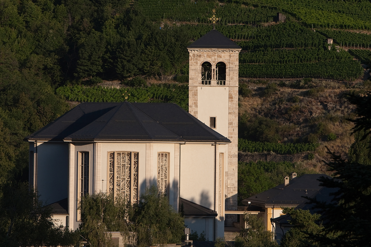 Pfarrkirche St. Martin in Visp